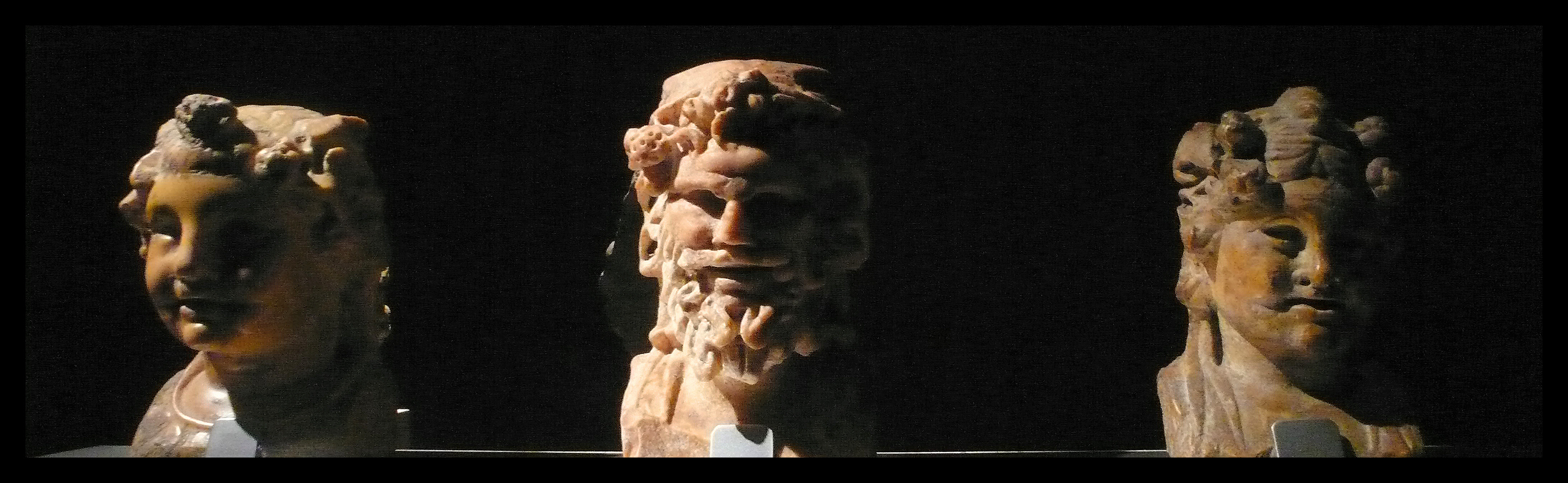 Uno de los motivos preferidos de la "jet set" romana para sus residencias de lujo fue el que hacía alusión al ciclo dionisíaco. Concretamente los hermae báquicos cumplirían una función añadida apotropaica. En Málaga se han encontrado un buen número.